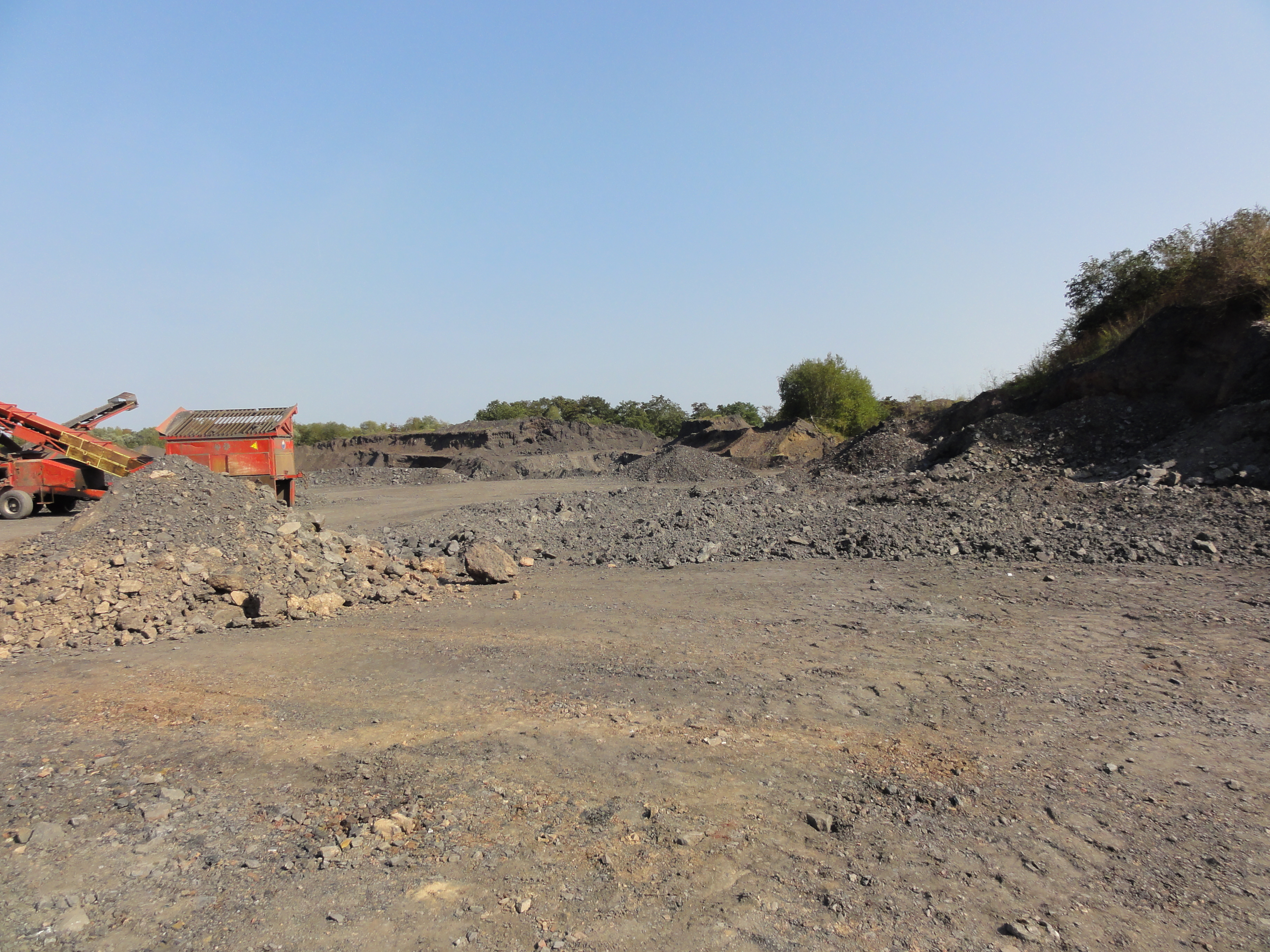 Terrils nos 201 et 202 respectivement dénommés Cuvinot et Cuvinot Ouest, Fosse Cuvinot de la Compagnie des mines d'Anzin, Onnaing, Nord, Nord-Pas-de-Calais, France.